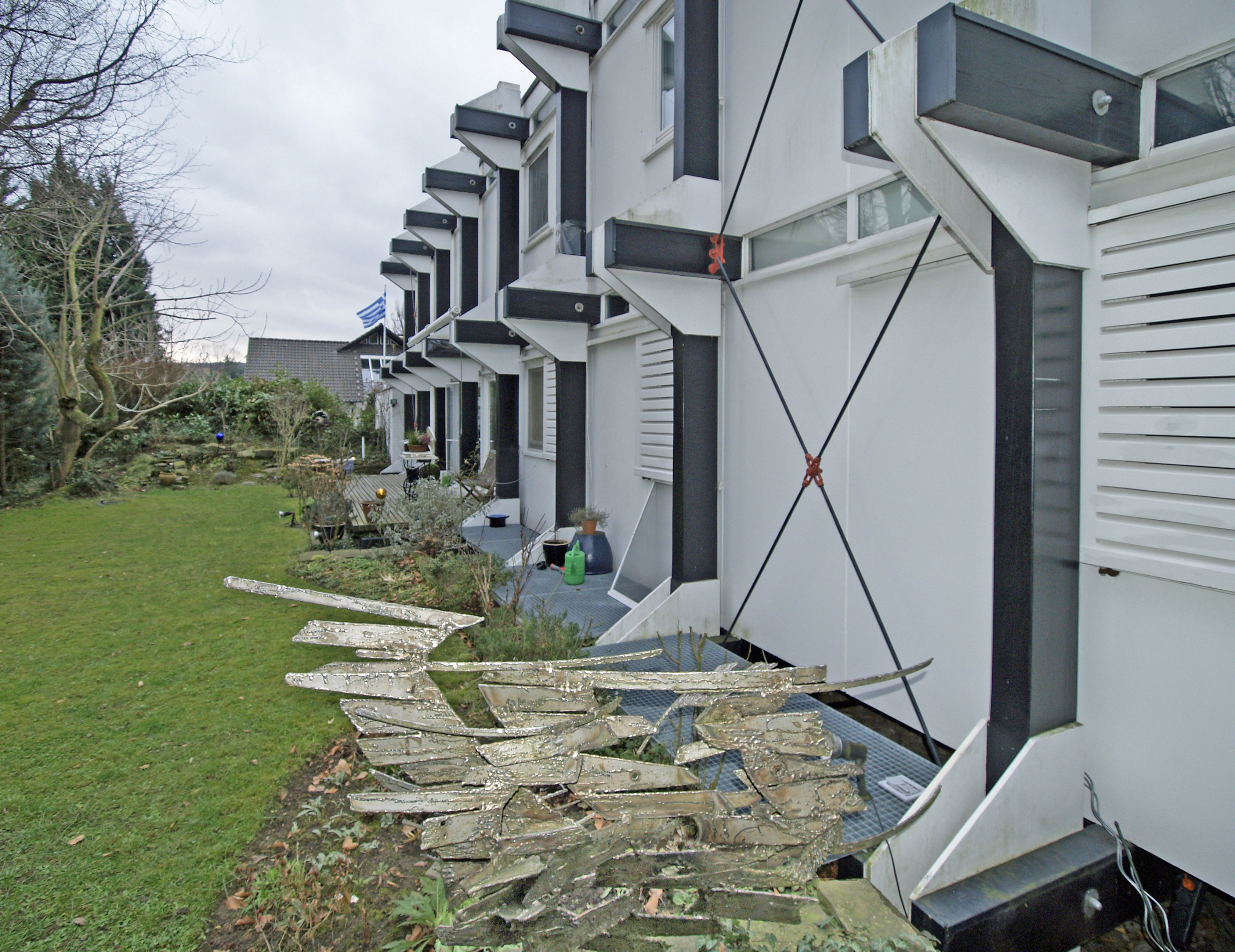 Haus Mayer-Kuckuk, Böckingstraße 9, Bad Honnef: Gartenseite; Skulptur „Troika“ (1961) von Friederich Werthmann